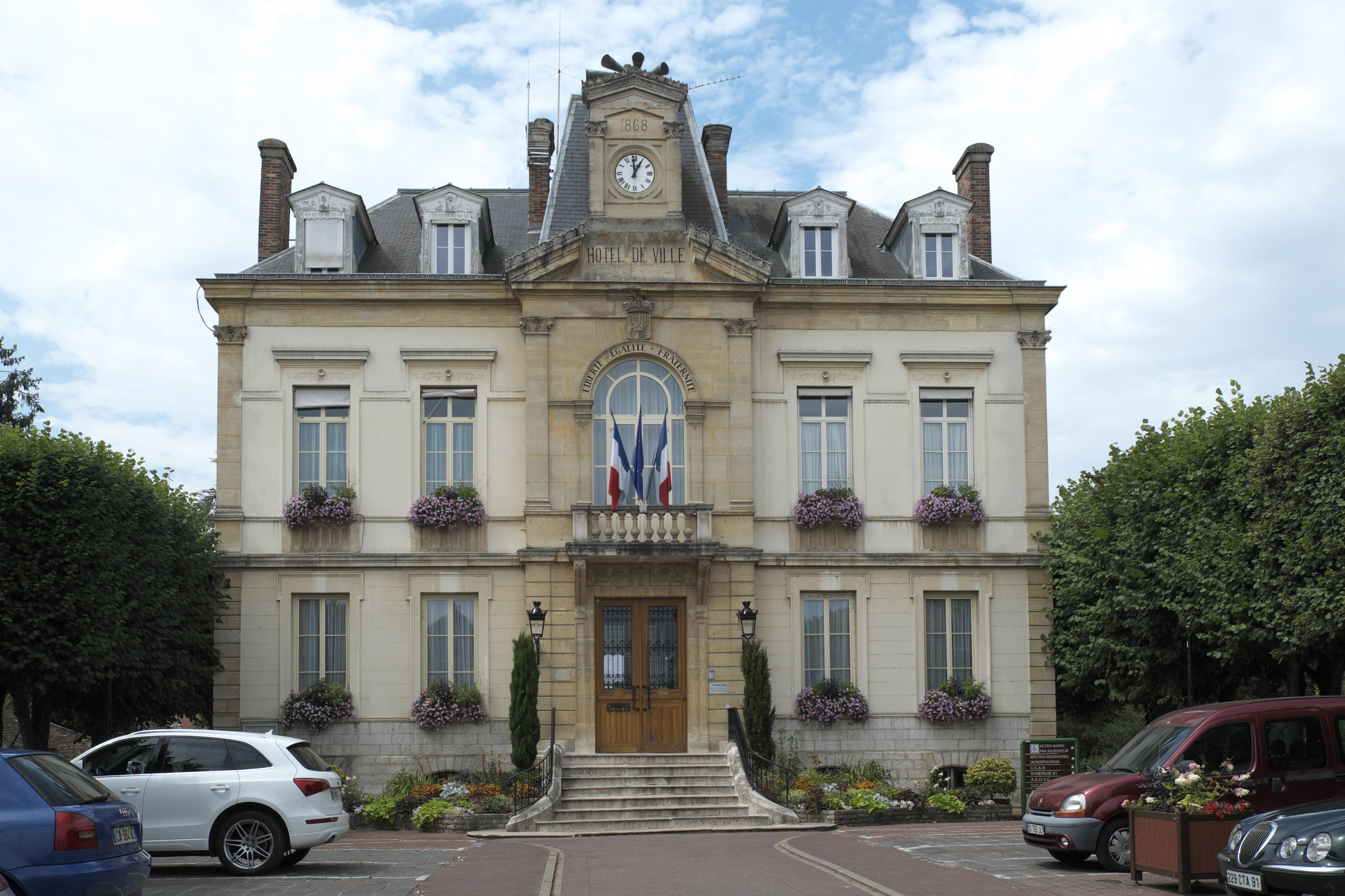 Rathaus (Hôtel de Ville) in Arpajon im Département Essonne (Île-de-France/Frankreich)